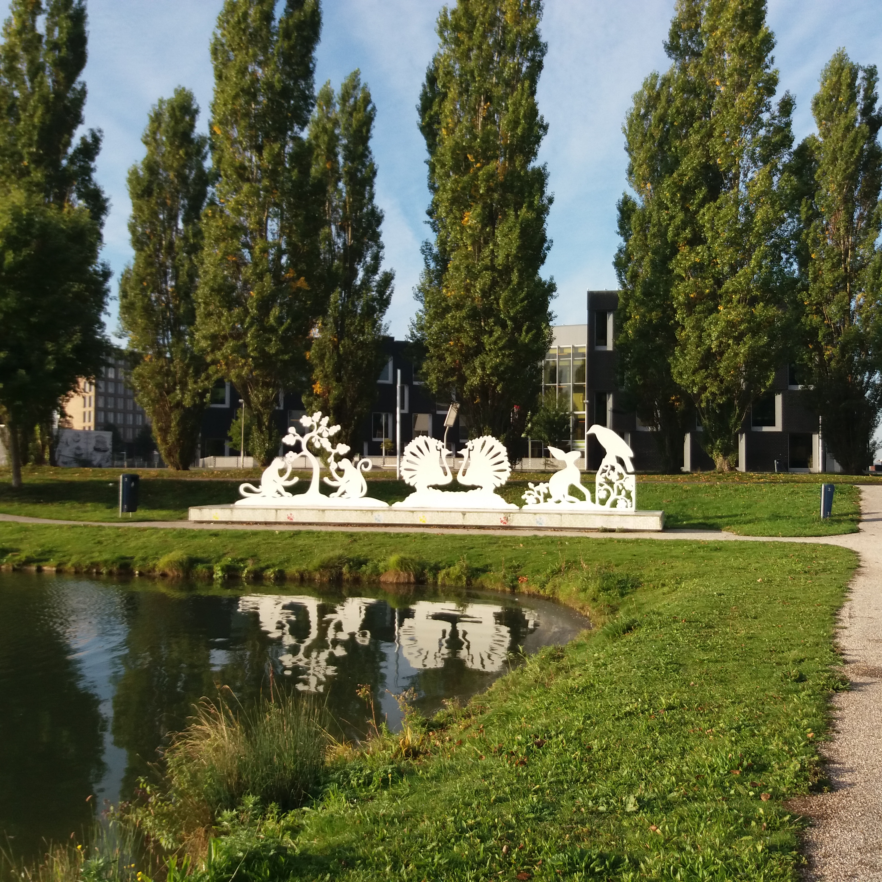 Kunstwerk À mon seul désir van Margot Berkman en Eline Janssens. Park Leeuwesteyn, in de wijk Leidsche Rijn te Utrecht.